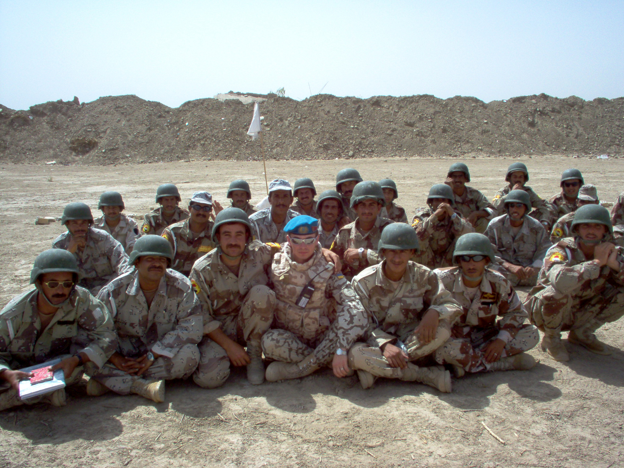 Зайчук в Іраці